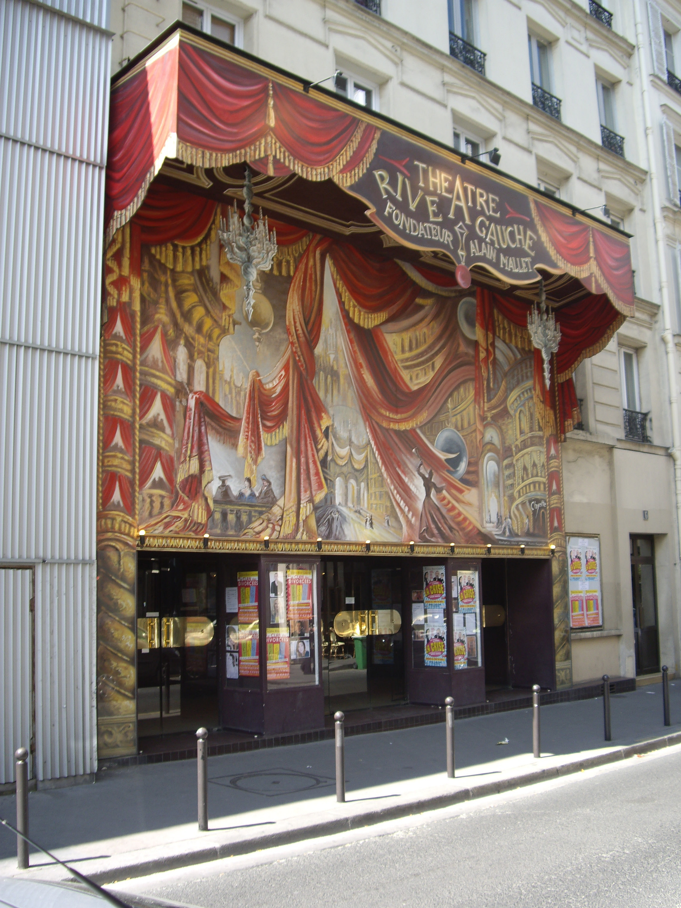 Théâtre Rive Gauche, 6 rue de la Gaîté, Paris 14e.